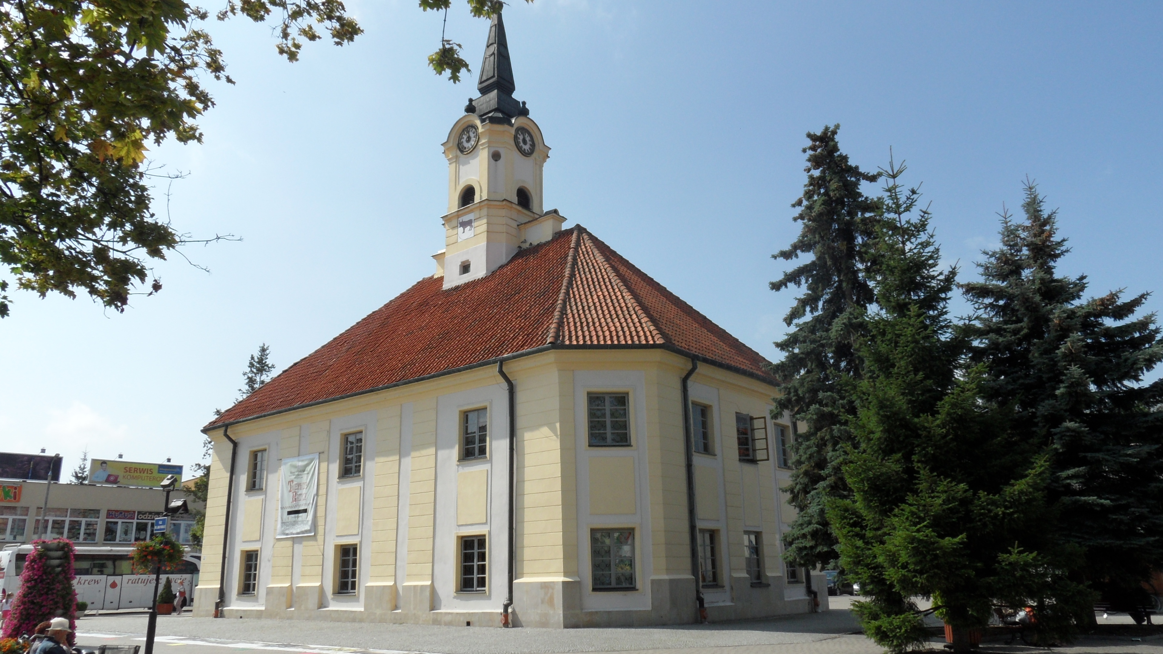 Ratusz w Bielsku Podlaskim, mur., XVII